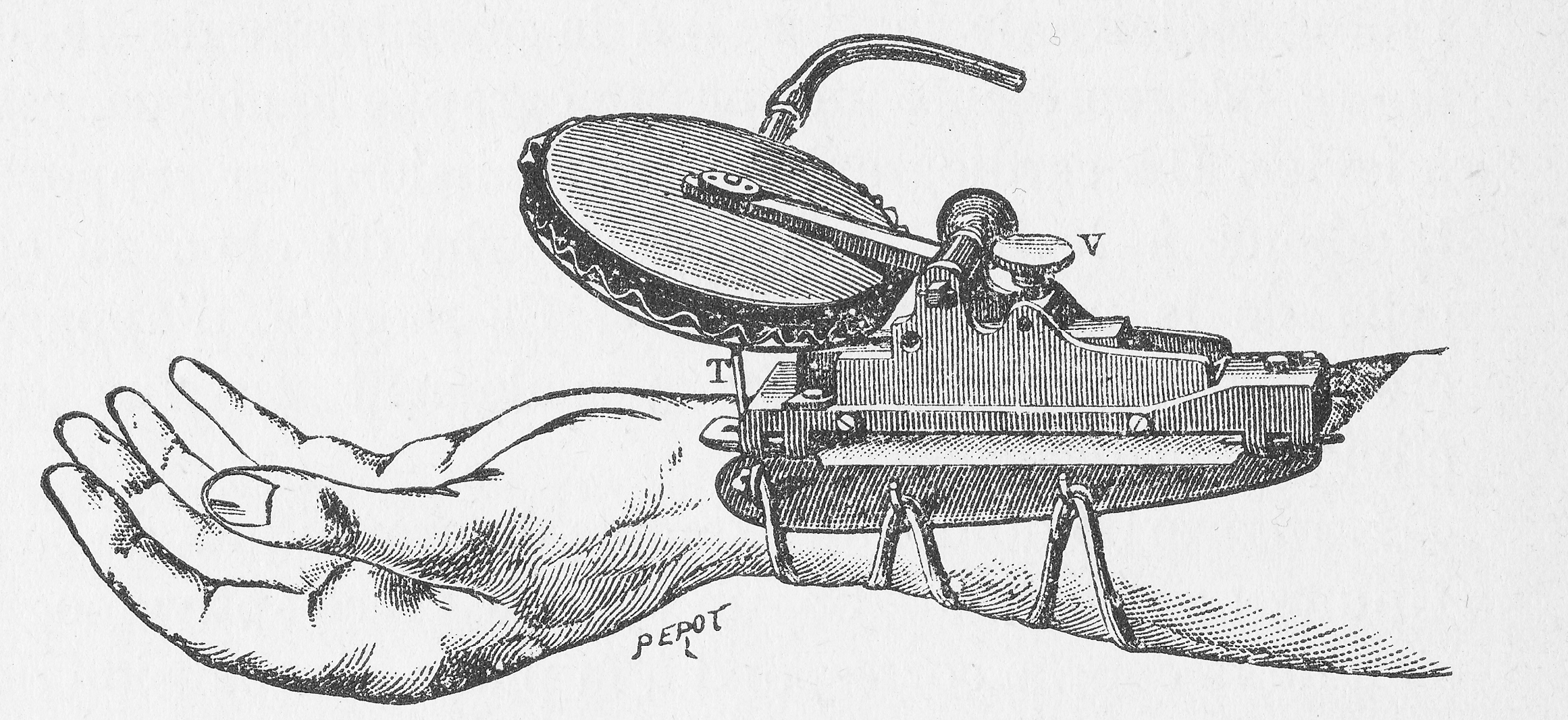 Sfygmograaf met transmissie van Marey